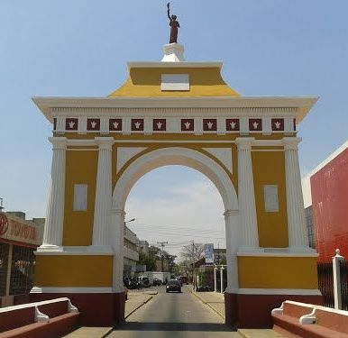 Vista del Monumento